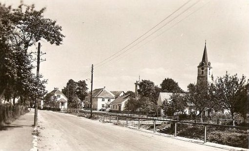 Palkovice, pohlednice z roku 1852